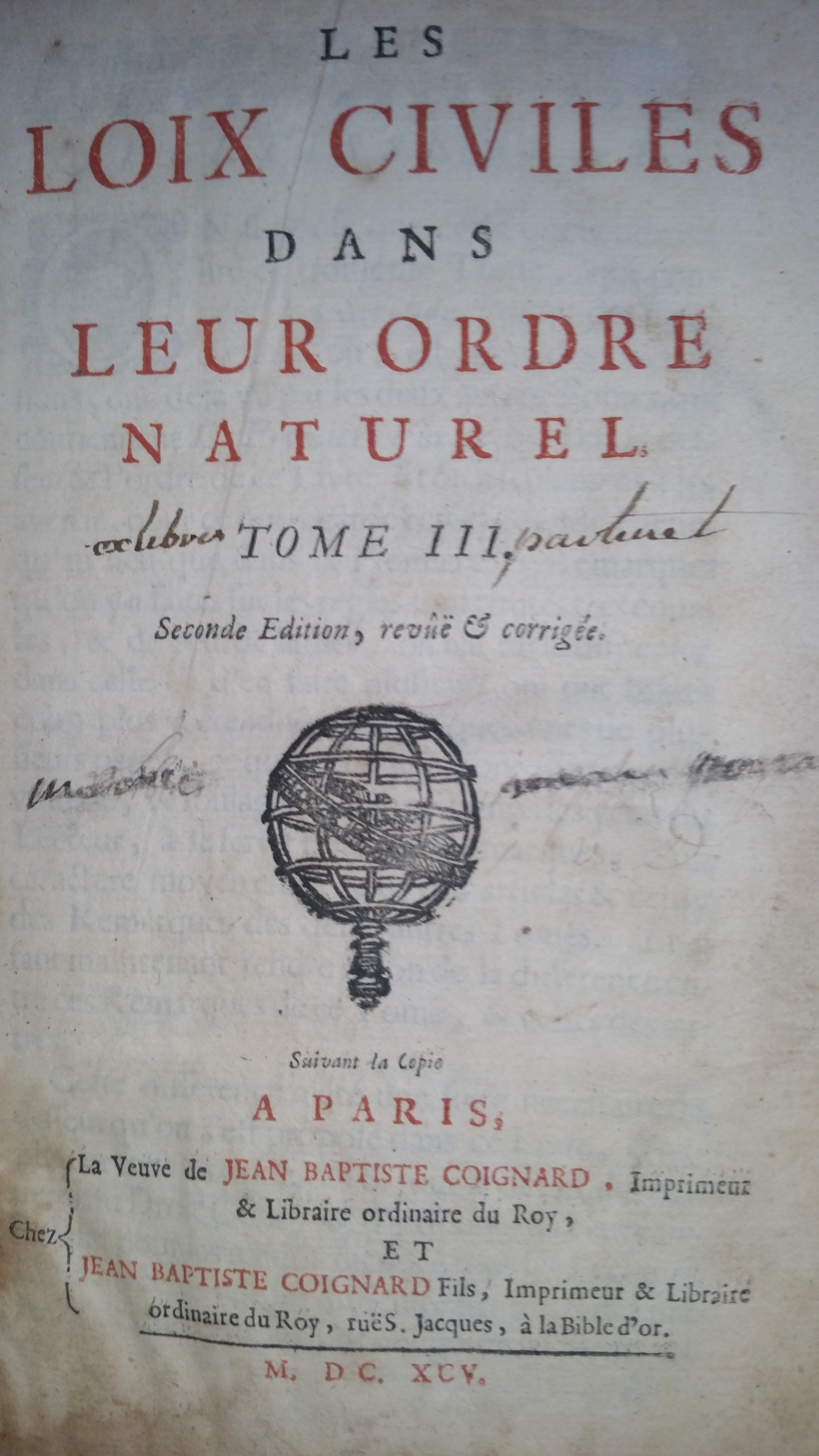 page de présentation du tome III de Les Loix Civiles dans leur Ordre Naturel